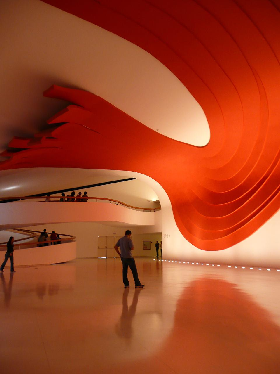 Parque Ibirapuera - Auditório